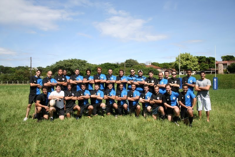 hawks maringa rugby